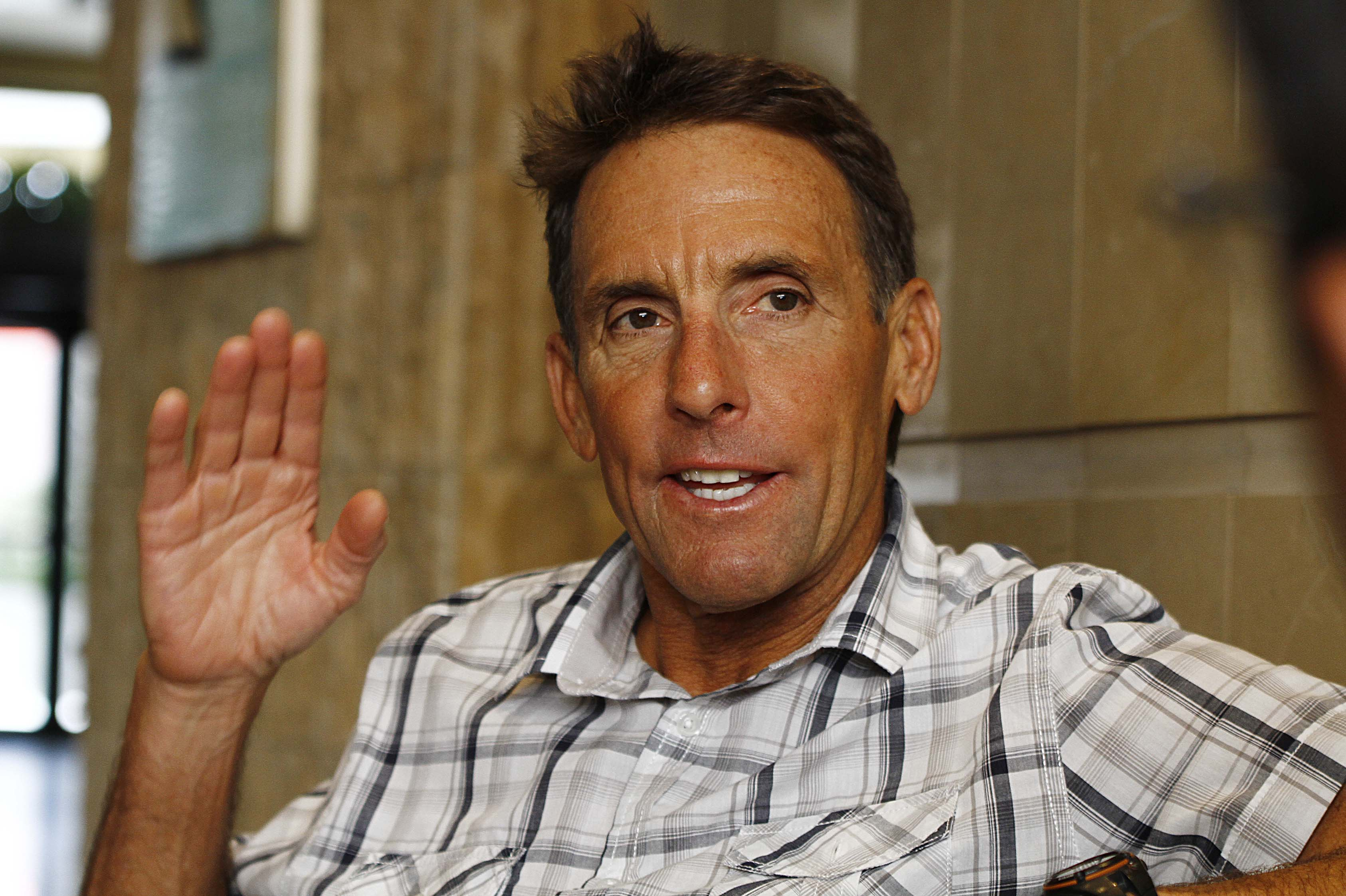 Quito, 23 de junio (Andes).- La leyenda del Triatlón Dave Scott está de visita en nuestro país para dictar varias conferencias en Quito y Guayaquil. ANDES/Micaela Ayala V.